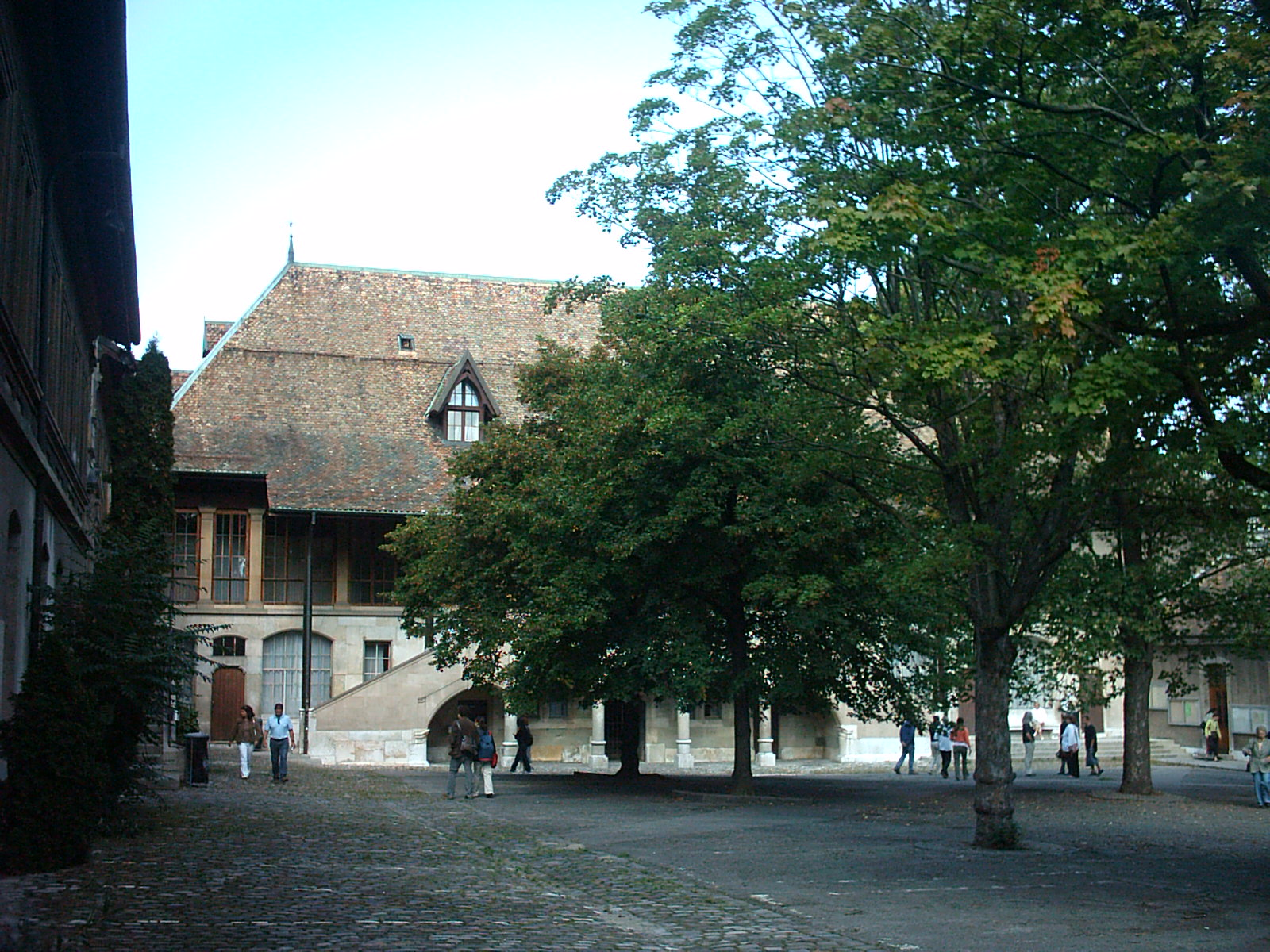 Cour du collège Calvin de Genève (Suisse)